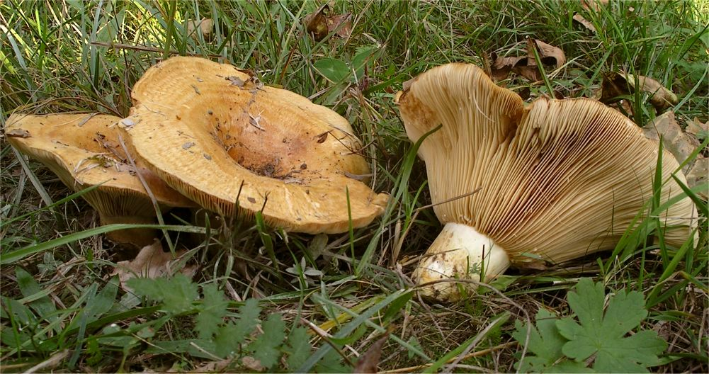 Lactarius zonarius (Bull.) Fr.